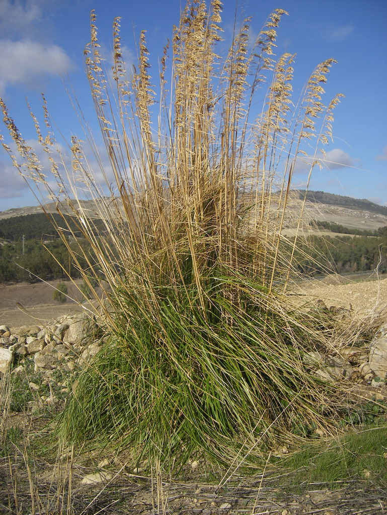 Ampelodesmos mauritanicus, foto scattata personalmente. Michele Iannizzotto